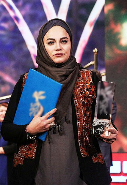 بهترین کارگردان جشنواره 37 فیلم فجر